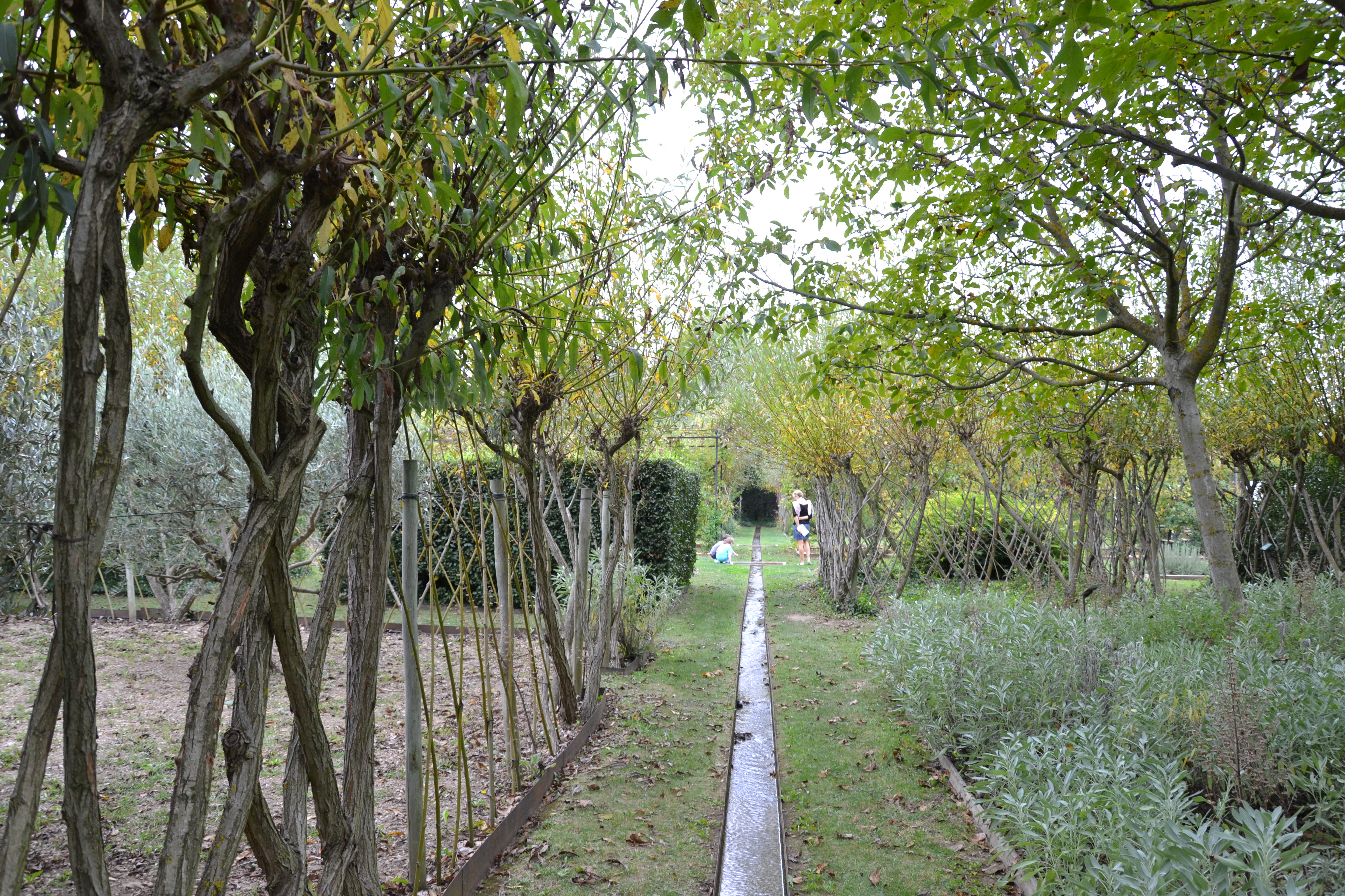 Mas de la Brune (Classé) .